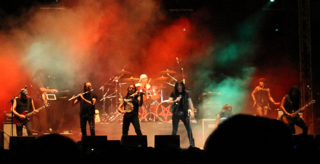 Mago de Oz